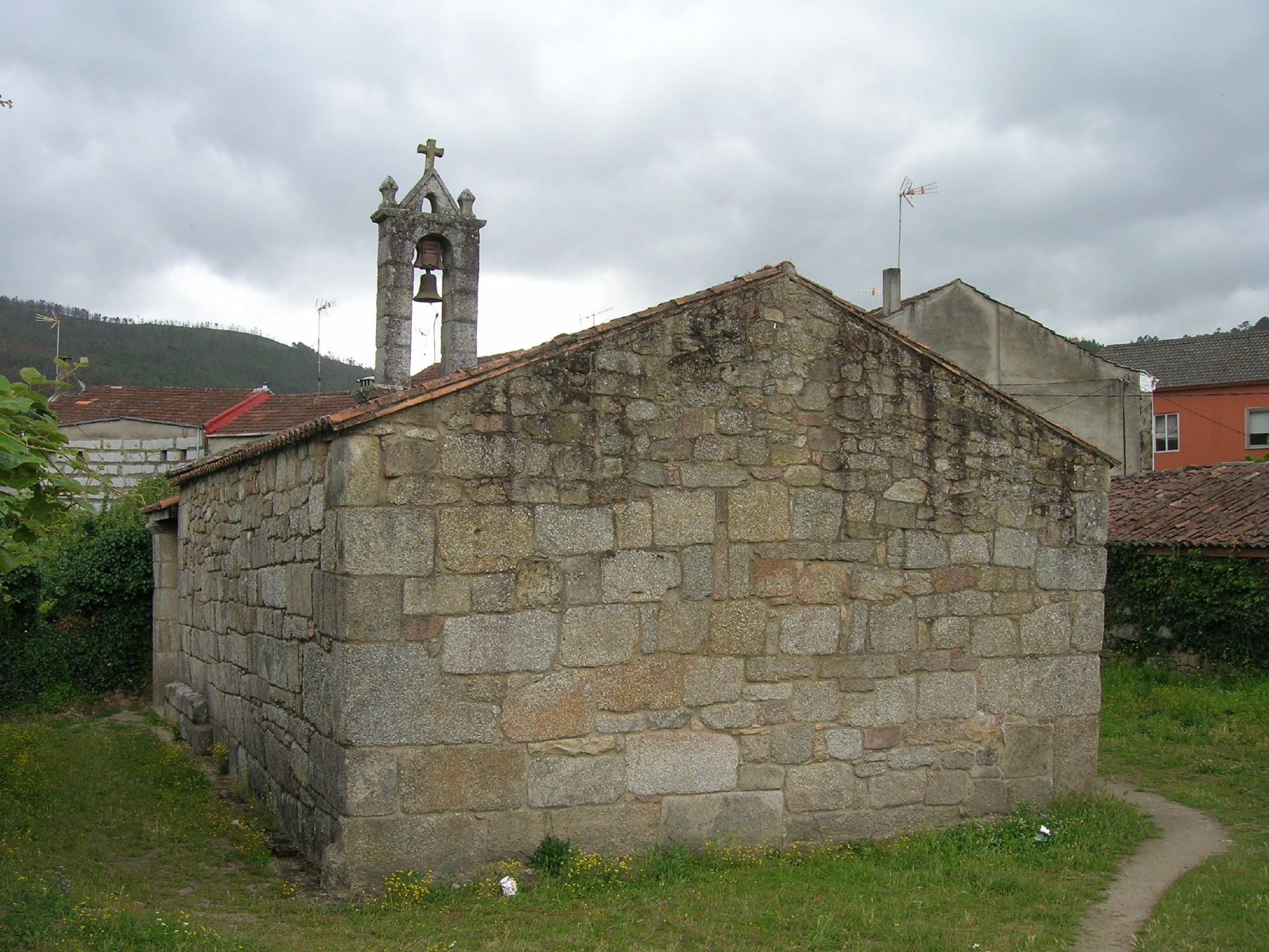 Cabeceira da Capela de San Xés de Francelos